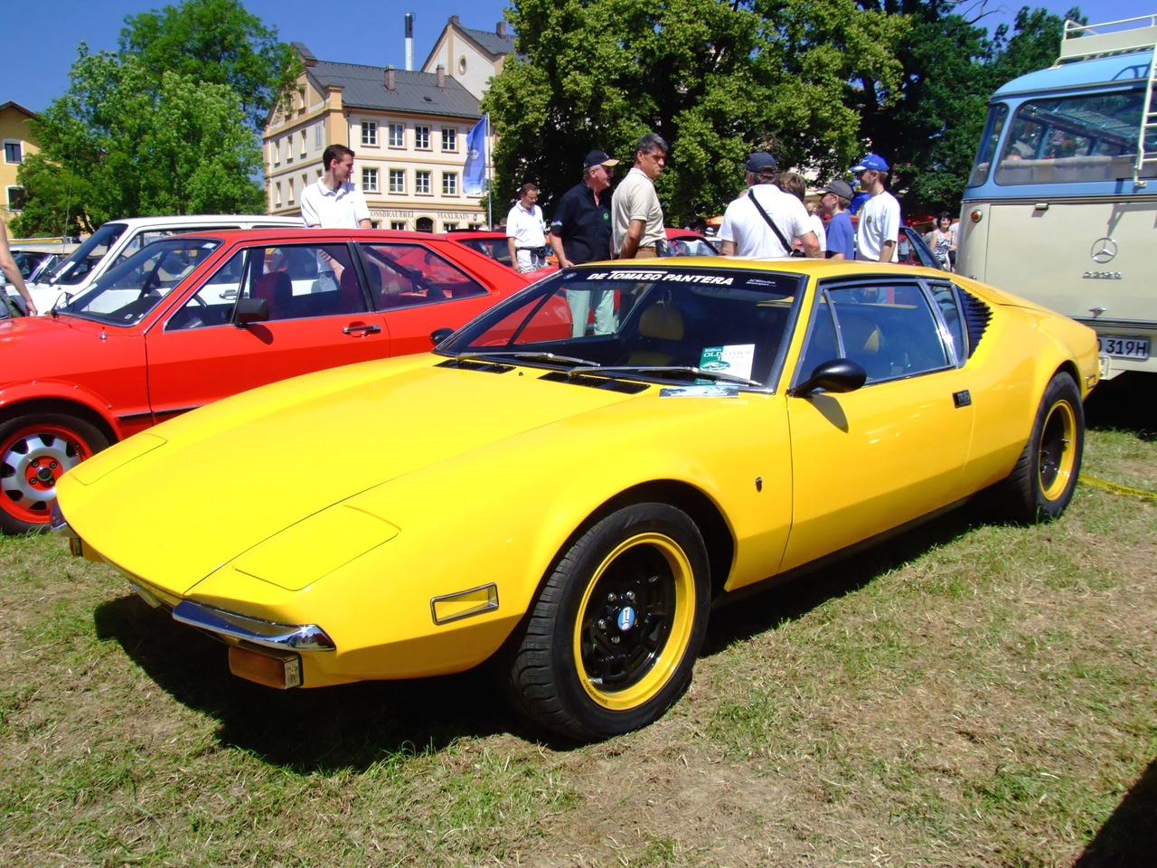 Quelle: selbst fotografiert, 06/2007 Fotograf: Späth Chr.